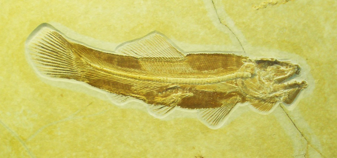 Fossil of Amiopsis, an extinct fish- Took the photo at Fossil Show, Munchen 2011